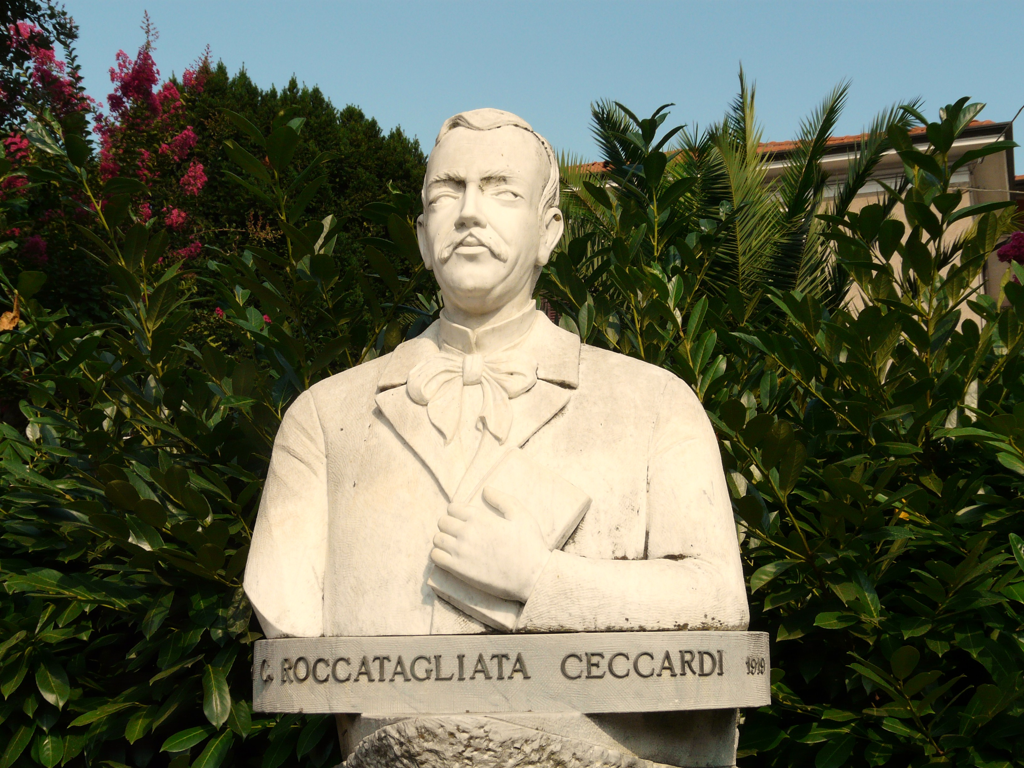 Busto marmoreo a Ceccardo Roccatagliata Ceccardi a Ortonovo, Liguria, Italia